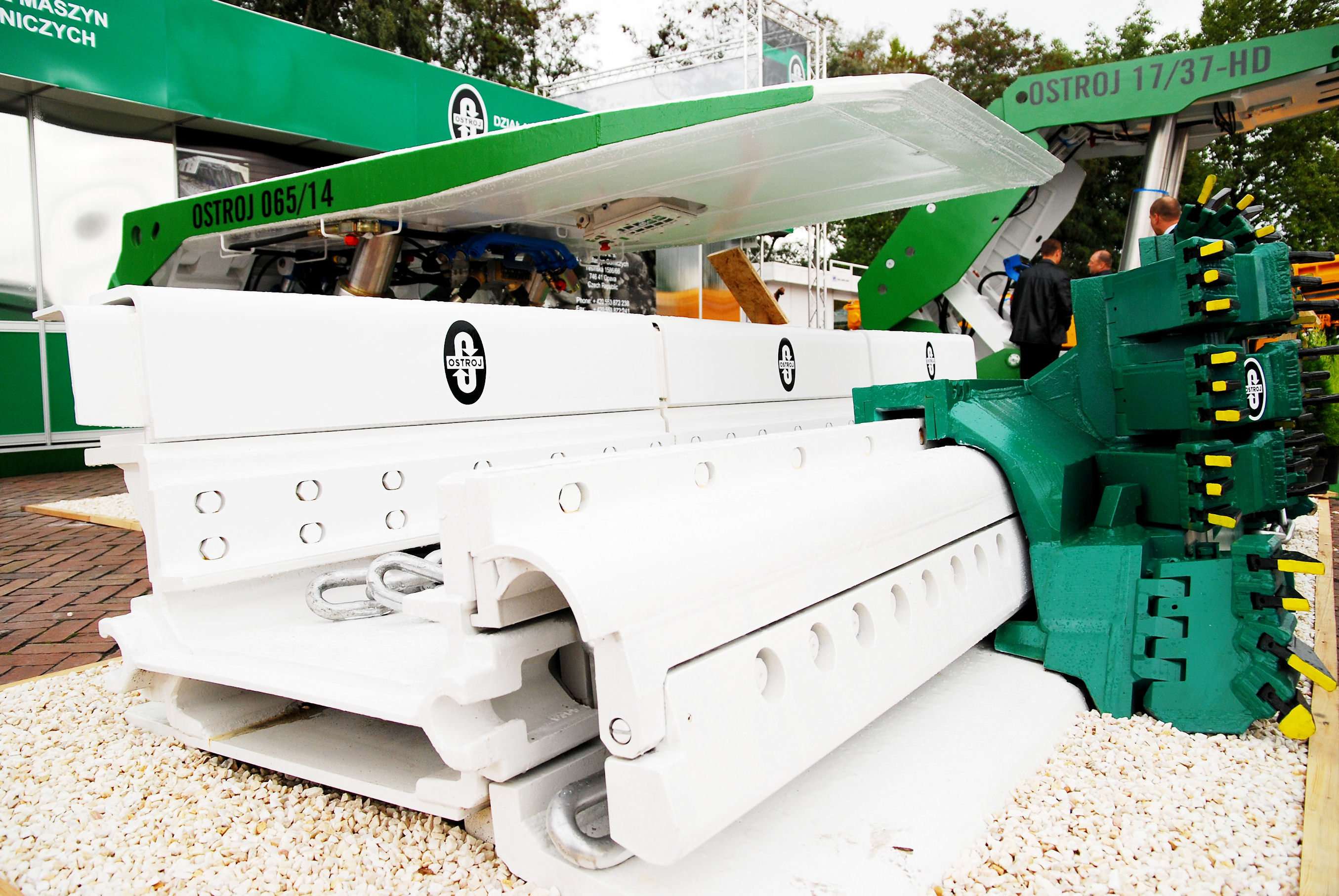 Urządzenie górnicze zdjęcie wykonane podczas Międzynarodowych Targów Górnictwa, Przemysłu Energetycznego i Hutniczego w Katowicach w Spodku